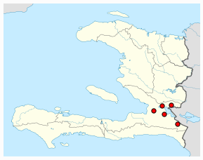 Comunas del arrondissement (distrito) de Croix-des-Bouquets